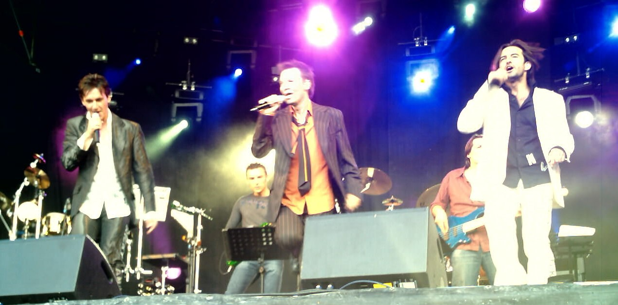 Bewerking van DE ROMEO'S.JPG die is voorzien van de {Eigenwerk}-licentie. Deze bewerking heeft niet de dikke rode tekst onderaan waar de maker wordt vermeld en is dus geschikter voor in het artikel over de band.